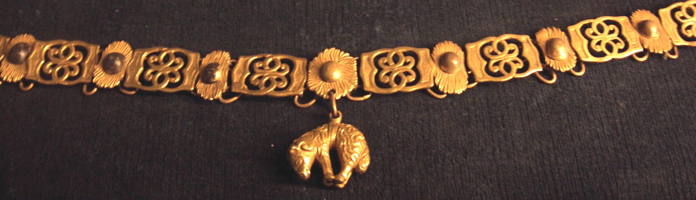 Halskette Orden vom Goldenen Vlies Schatzkammer der Münchner Residenz